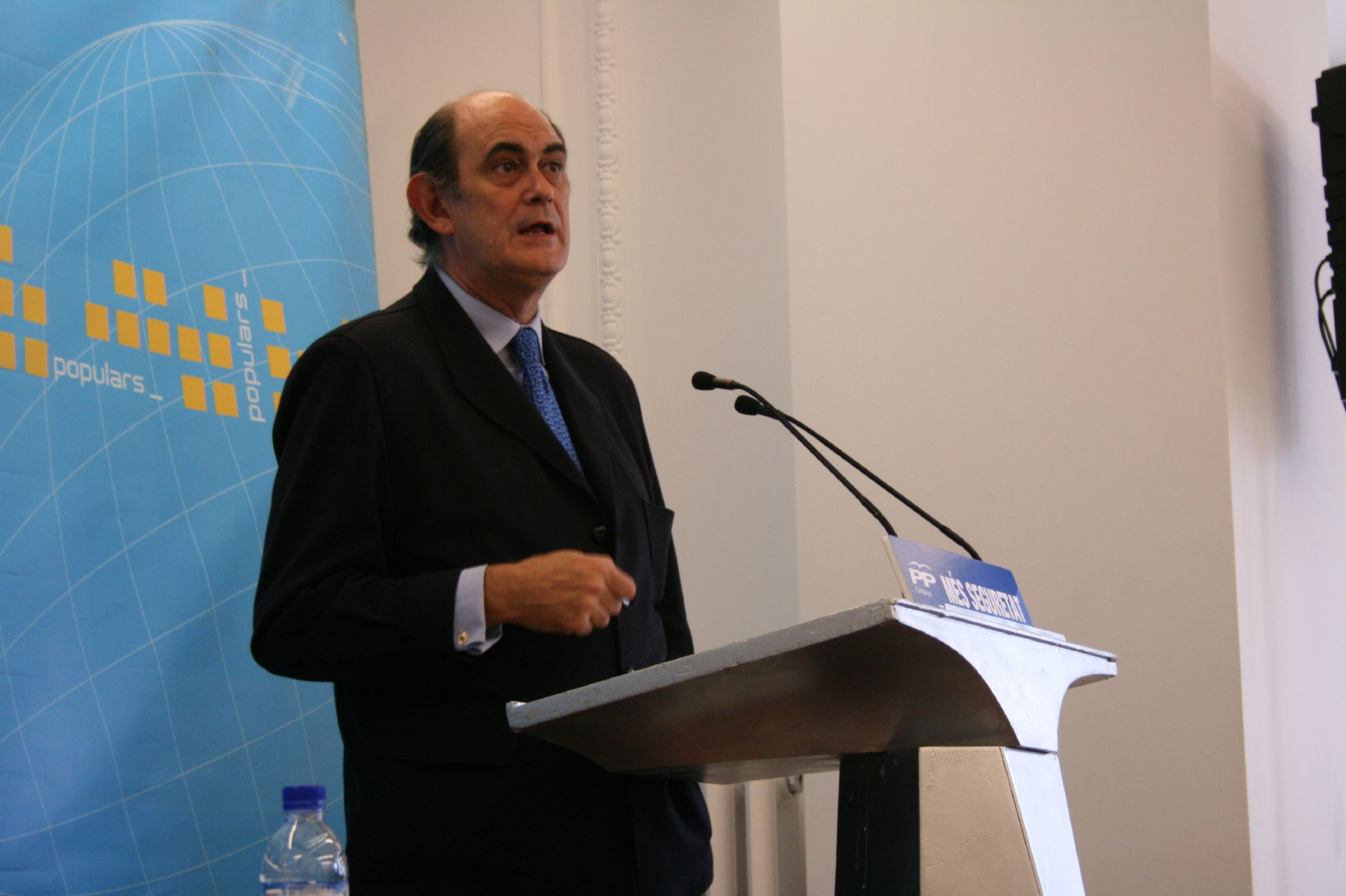 Ignacio Astarloa en las Jornadas de Seguridad del Partido Popular celebradas el 19 de octubre de 2007 en Barcelona.